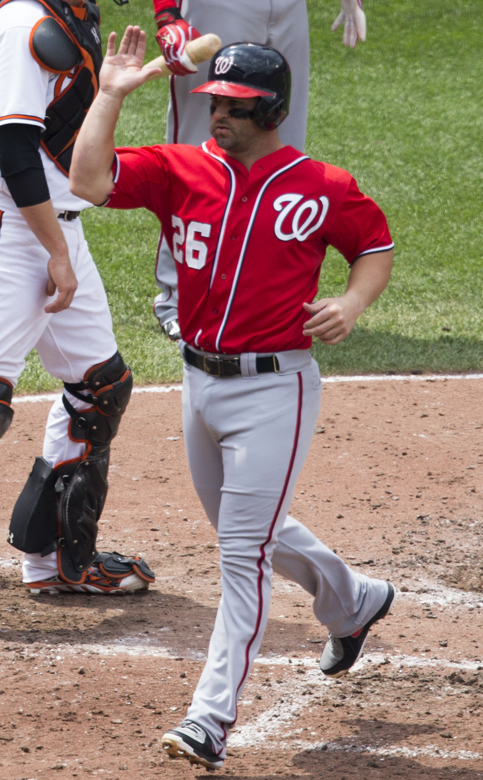 Dan Uggla